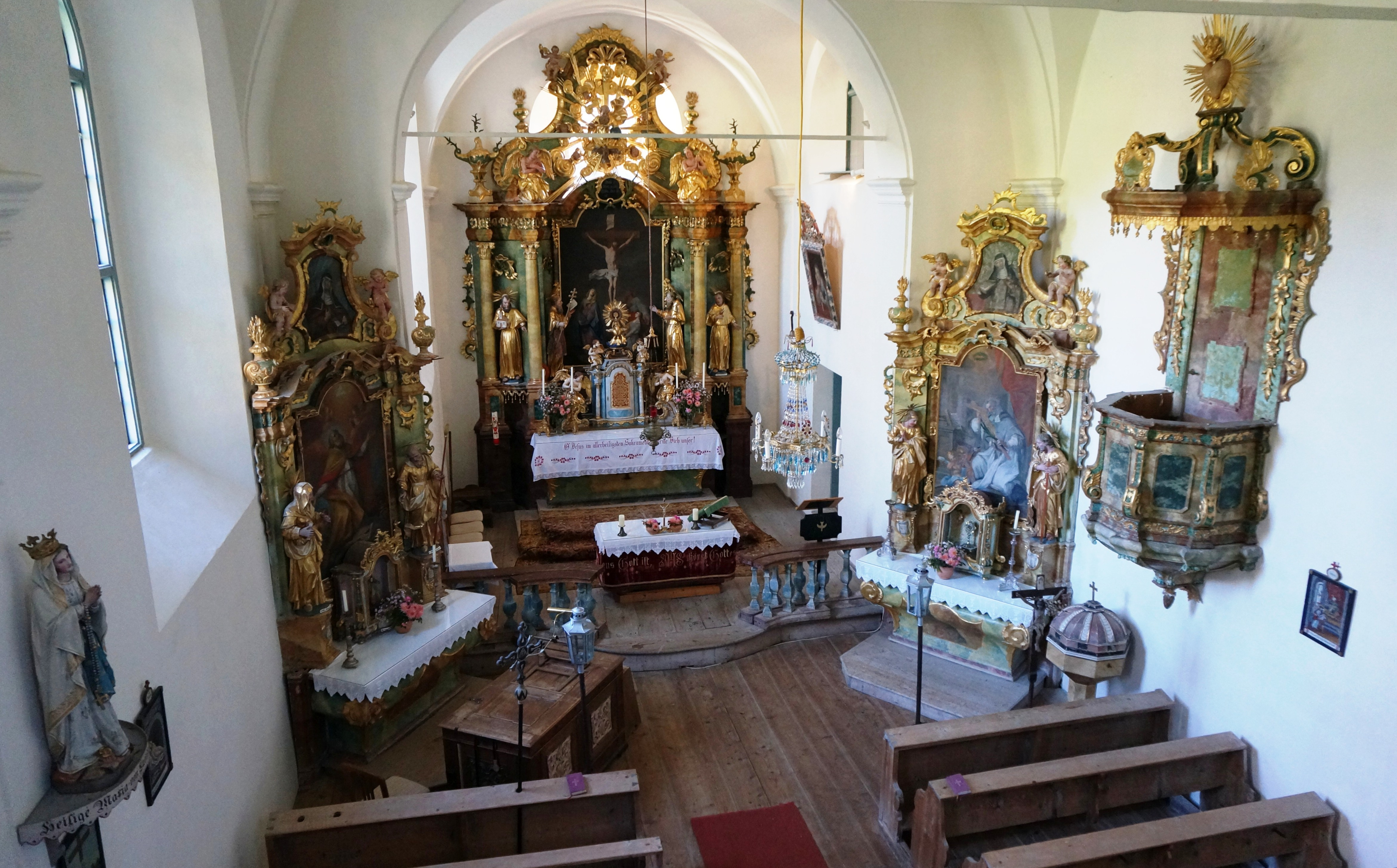 Arriach - Klösterle Dieses Bild wurde anlässlich des österreichischen Tags des Denkmals 2016 in Kärnten eingereicht.